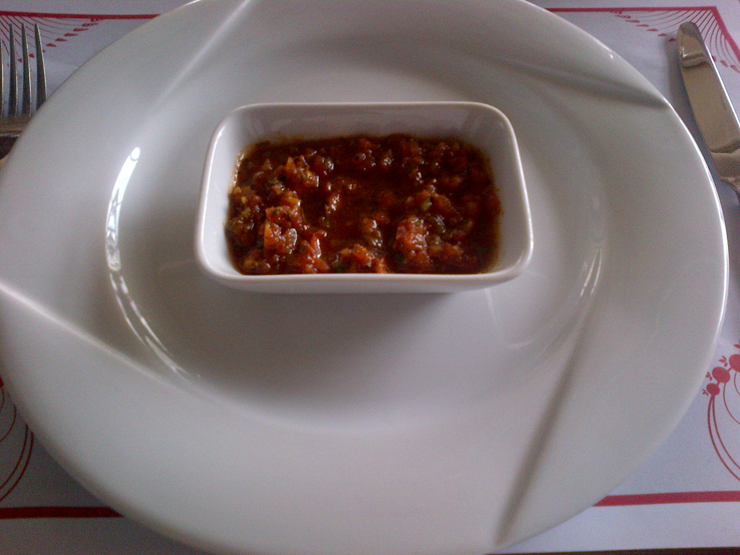 Ezme, un meze de la cocina turca, parecido al pebre chileno, pero con perejil y no cilantro.